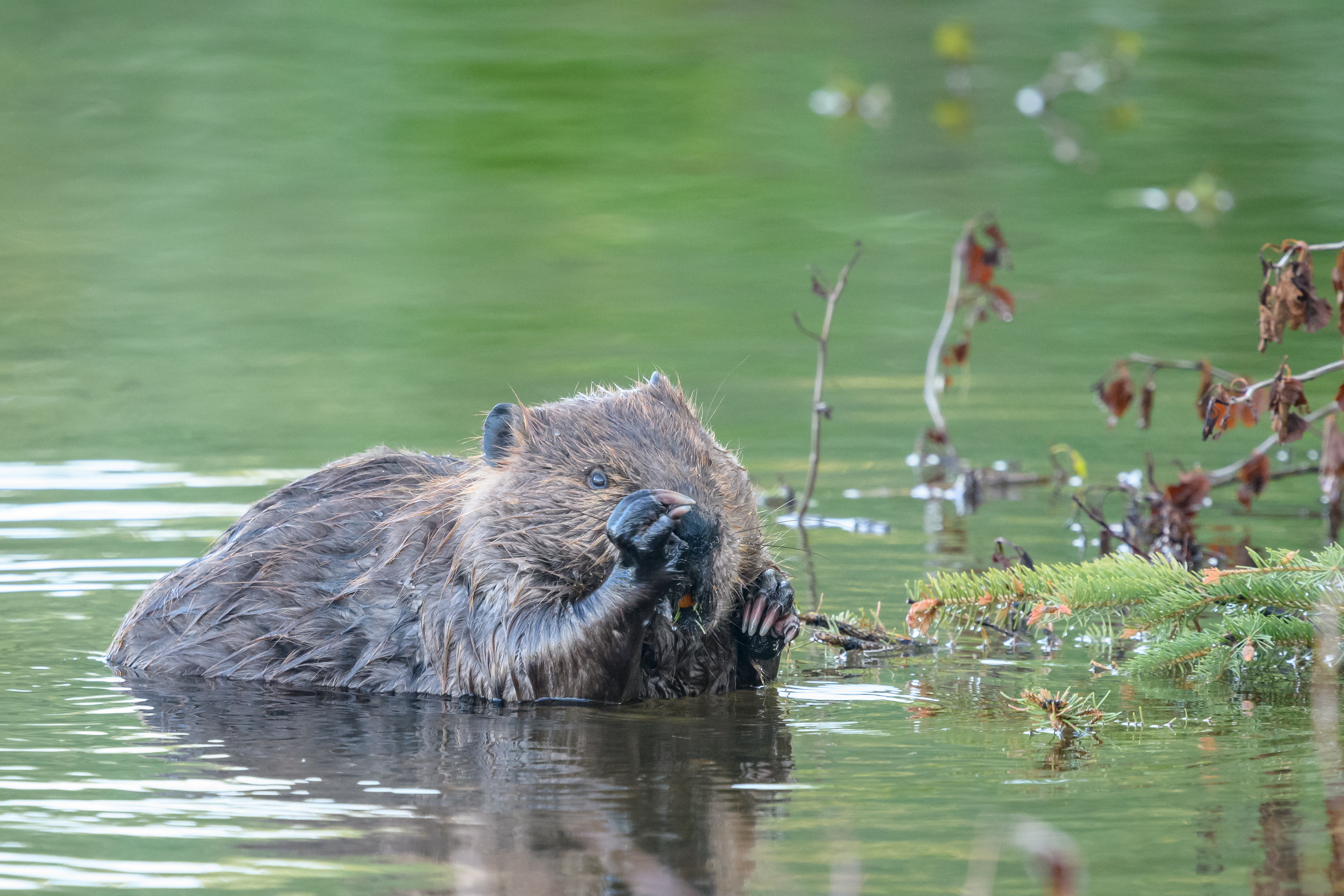 Cheena River, Fairbanks, Alaska